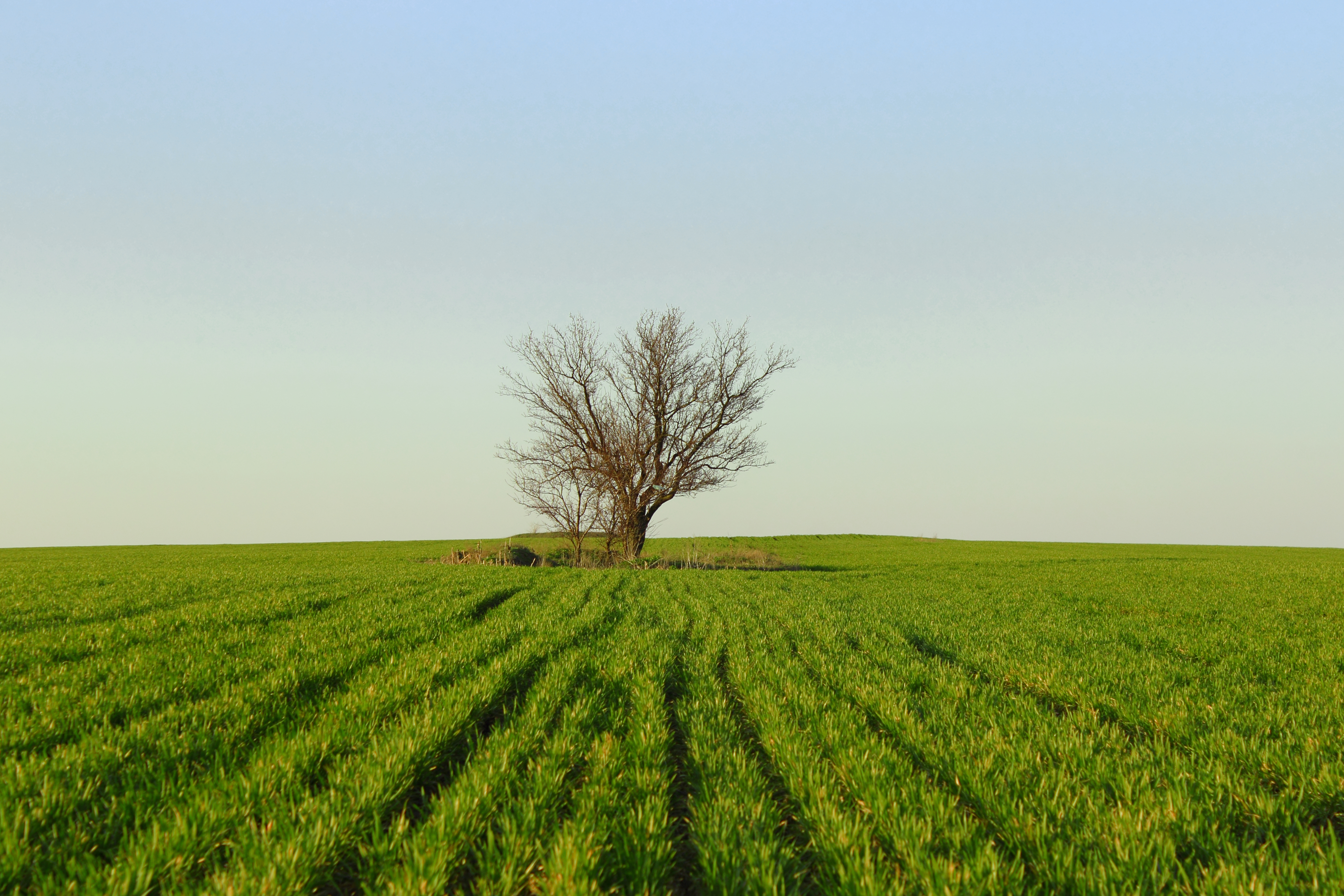 Весняна радість природи в Отченашкових наділах м. Підгородне Дніпропетровського району